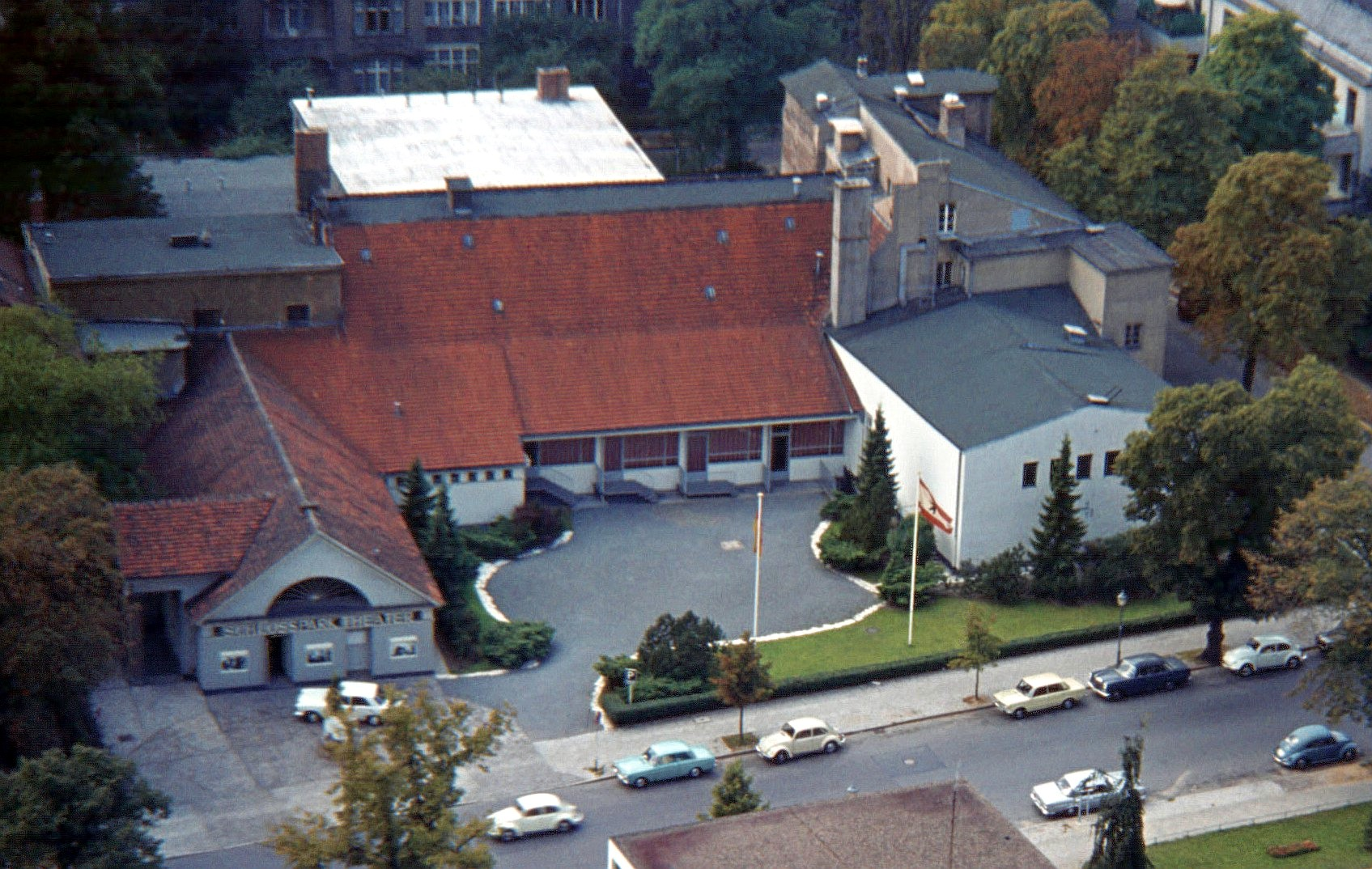 Blick vom Kreisel auf das Schlossparktheater (Foto aus dem Jahr 1972)